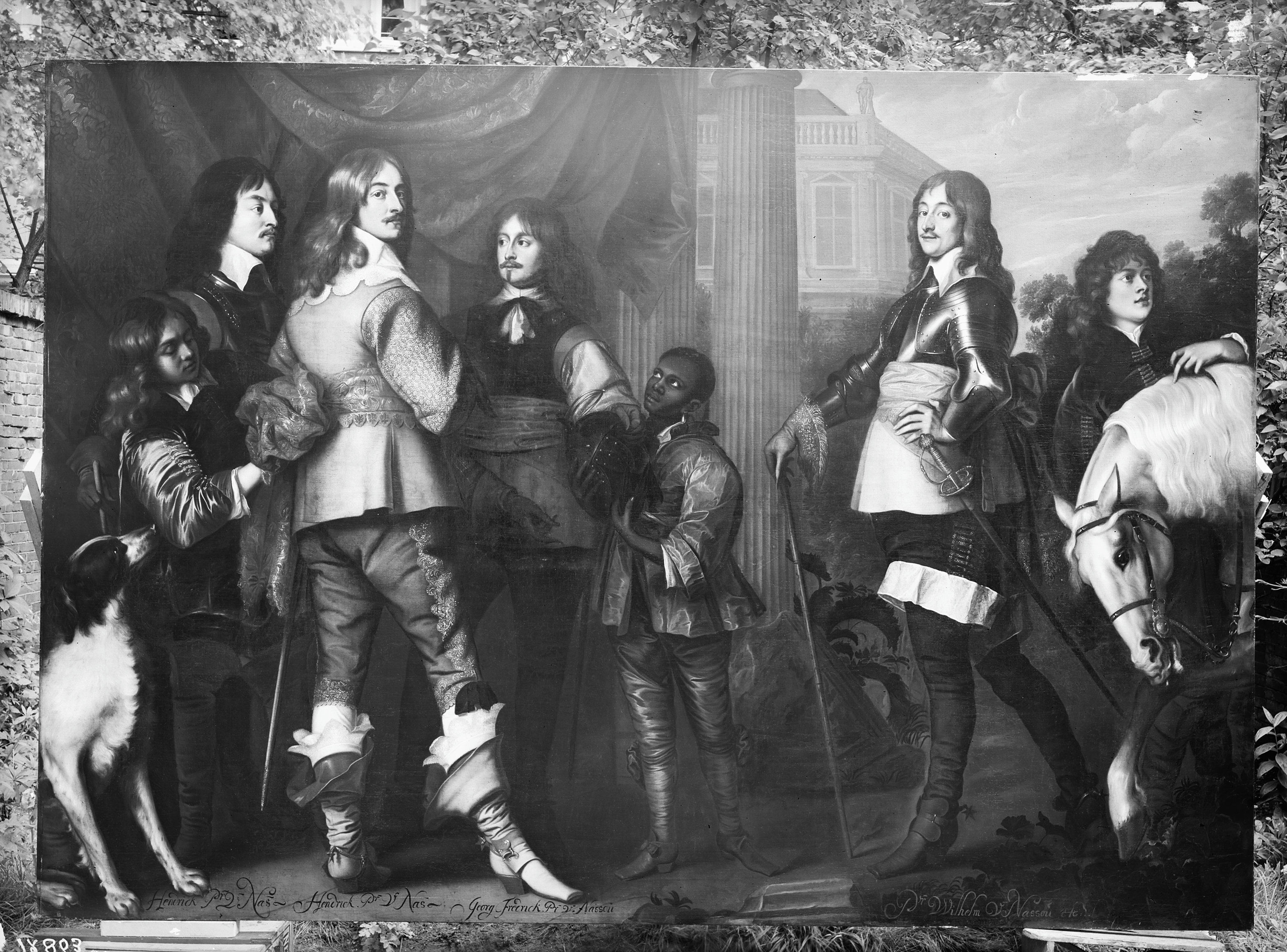 vm. Stadhouderlijk Hof of Paleis: schilderij: H.Prins van Nassau -H.Prins van Nassau- Georg Prins van Nassau -Willem Prins van Nassau